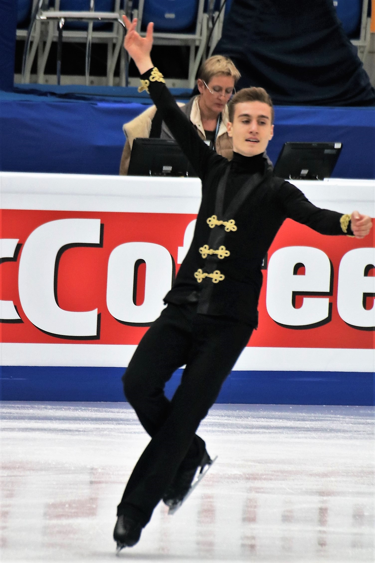 Маттео Риццо (Италия) на Чемпионате Европы по фигурному катанию 2018.